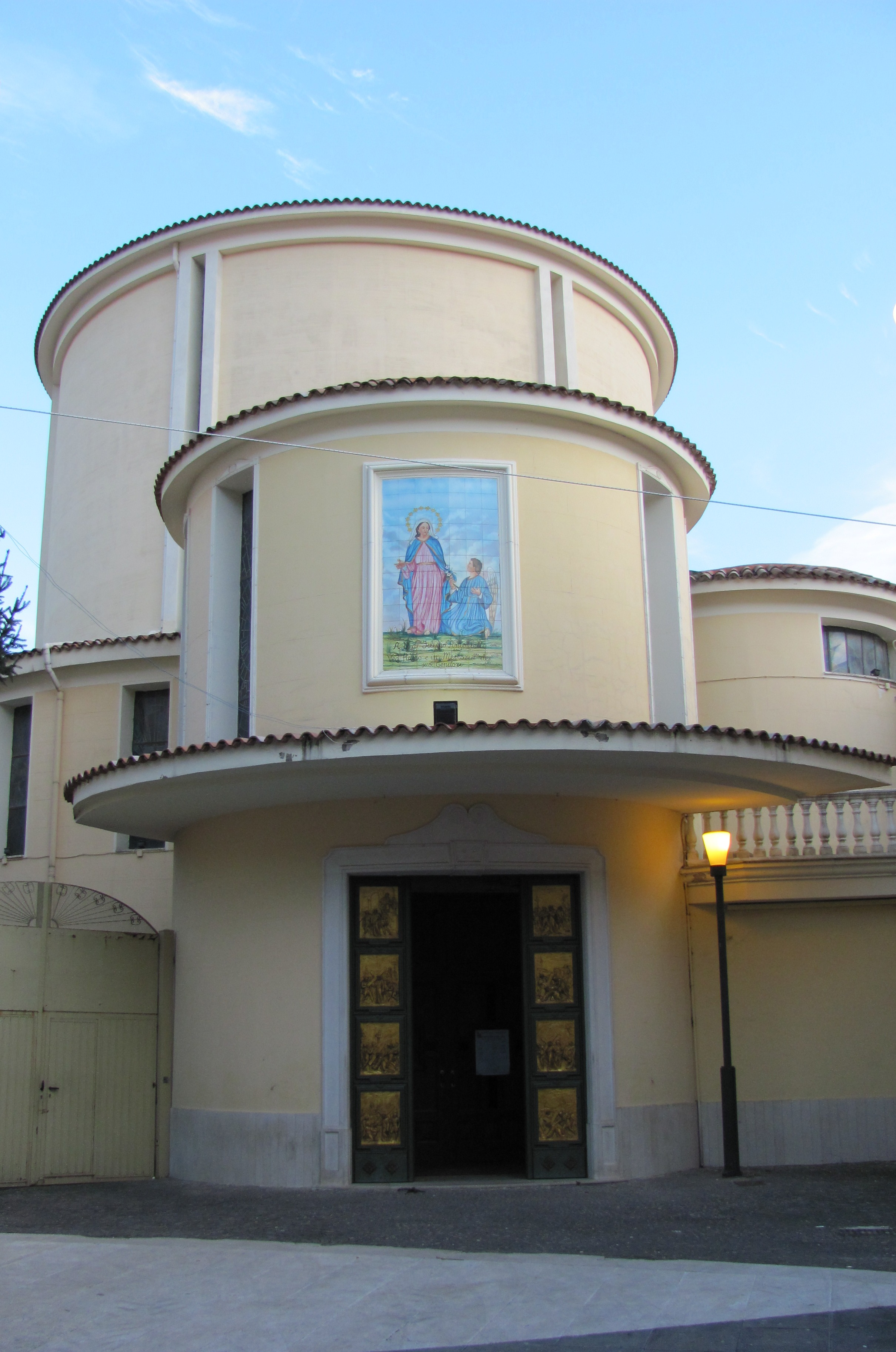 Chiesa di Maria Santissima Annunziata vista frontale SIANO SA (dicembre 2010)